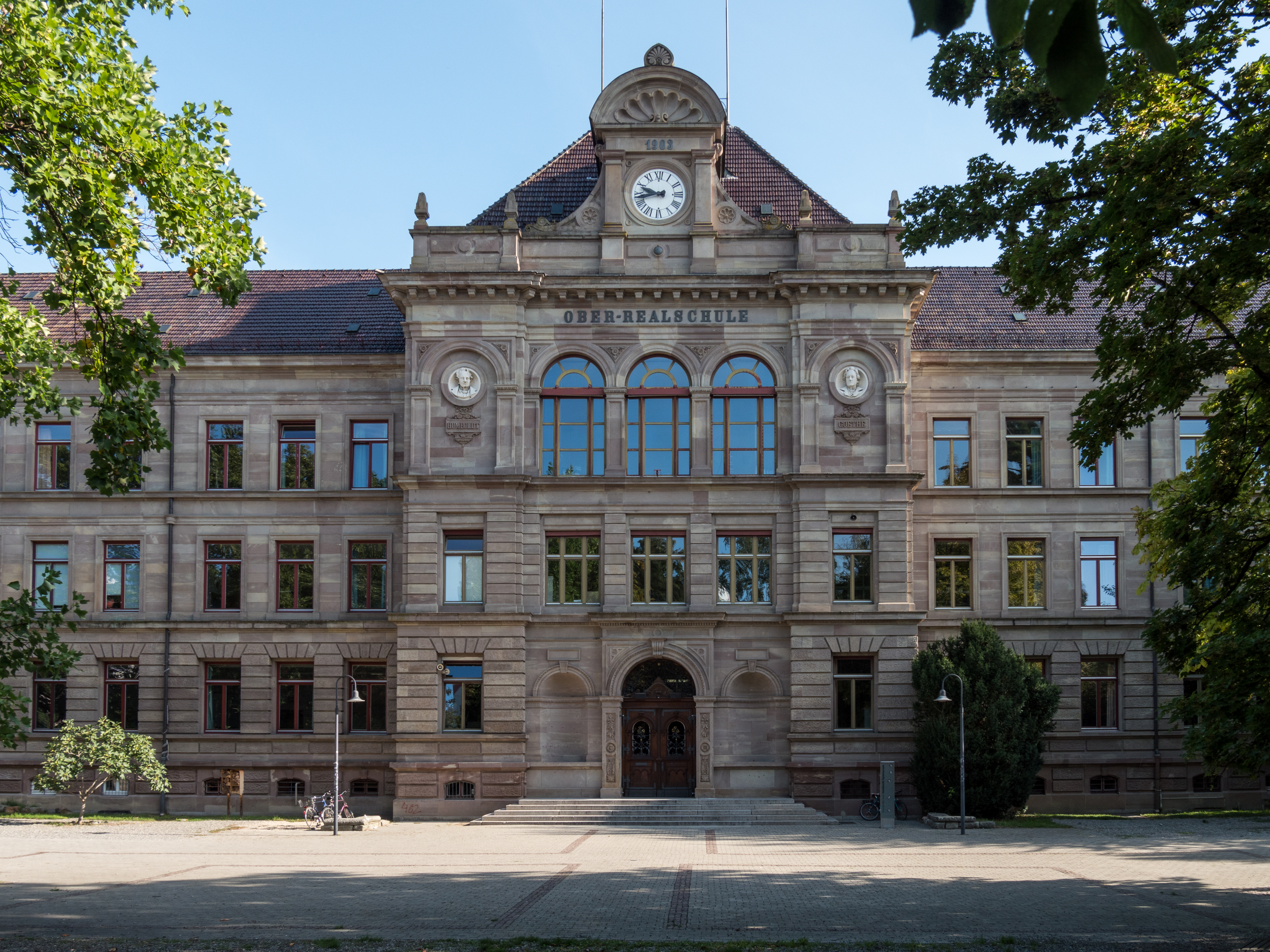 Teilansicht des Alexander-von-Humboldt-Gymnasium in Konstanz in 2018